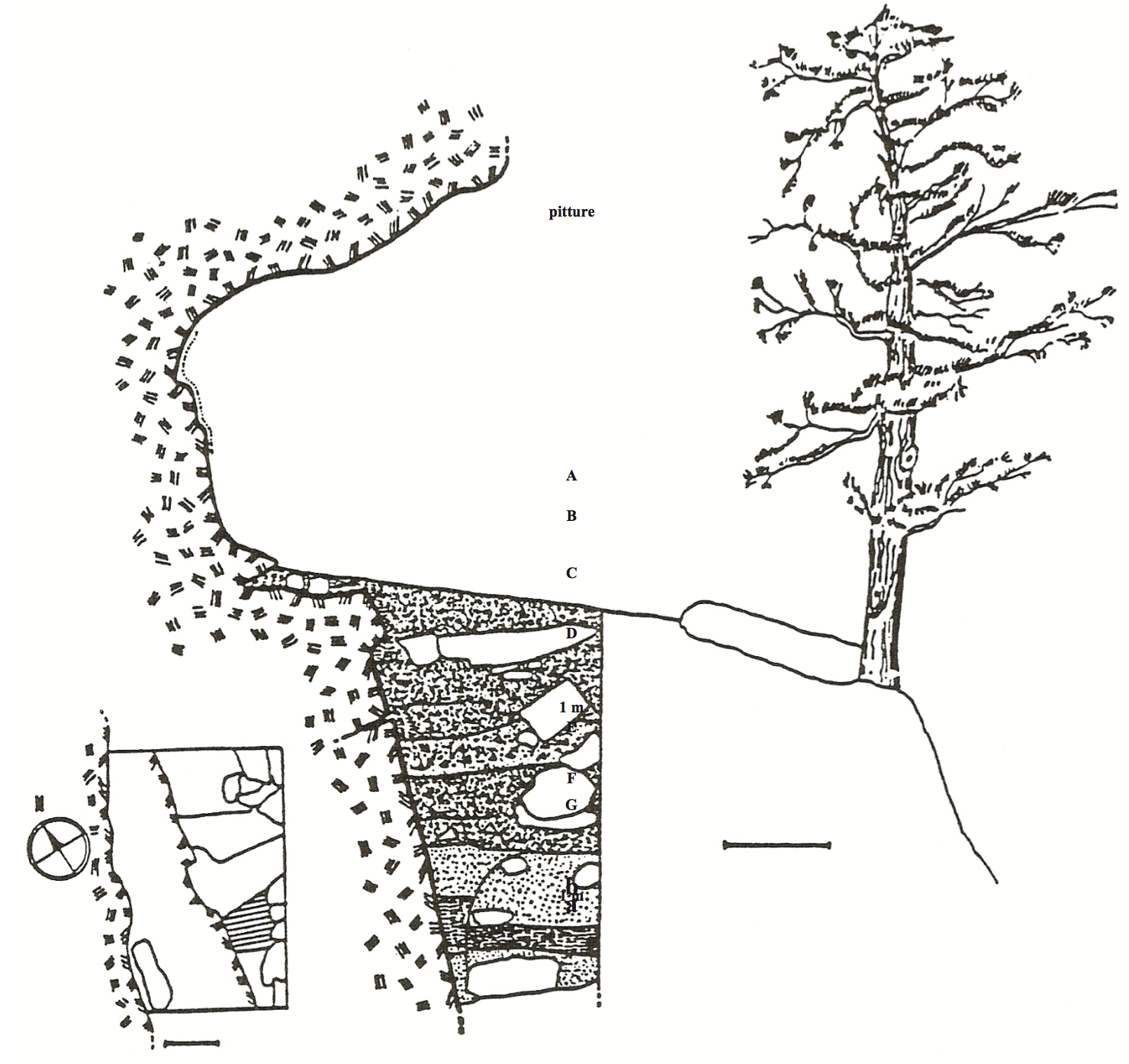 Disegno schematizzante la stratificazione di Tuppo dei Sassi, precisamente del "Riparo Ranaldi", eseguito dal prof. Edoardo Borzatti von Lowenstern in occasione della campagna di scavi del 1971